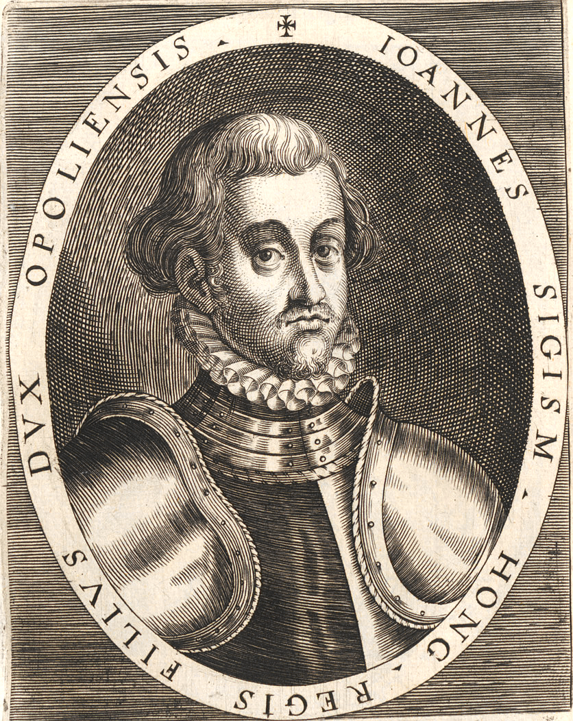 János Zsigmond (Buda, 1540. július 7. – Gyulafehérvár, 1571. március 14.) 1540-től 1570-ig II. János néven választott magyar király (rex electus), Erdély első fejedelme (princeps Transylvaniae, 1565–1571).